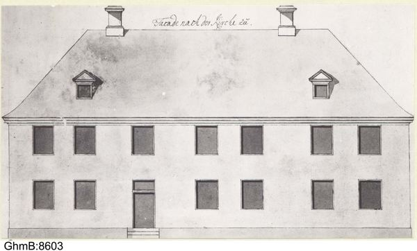 Lokal för Tyska Skolan. Uppförd år 1734, nedbrunnen 1746.